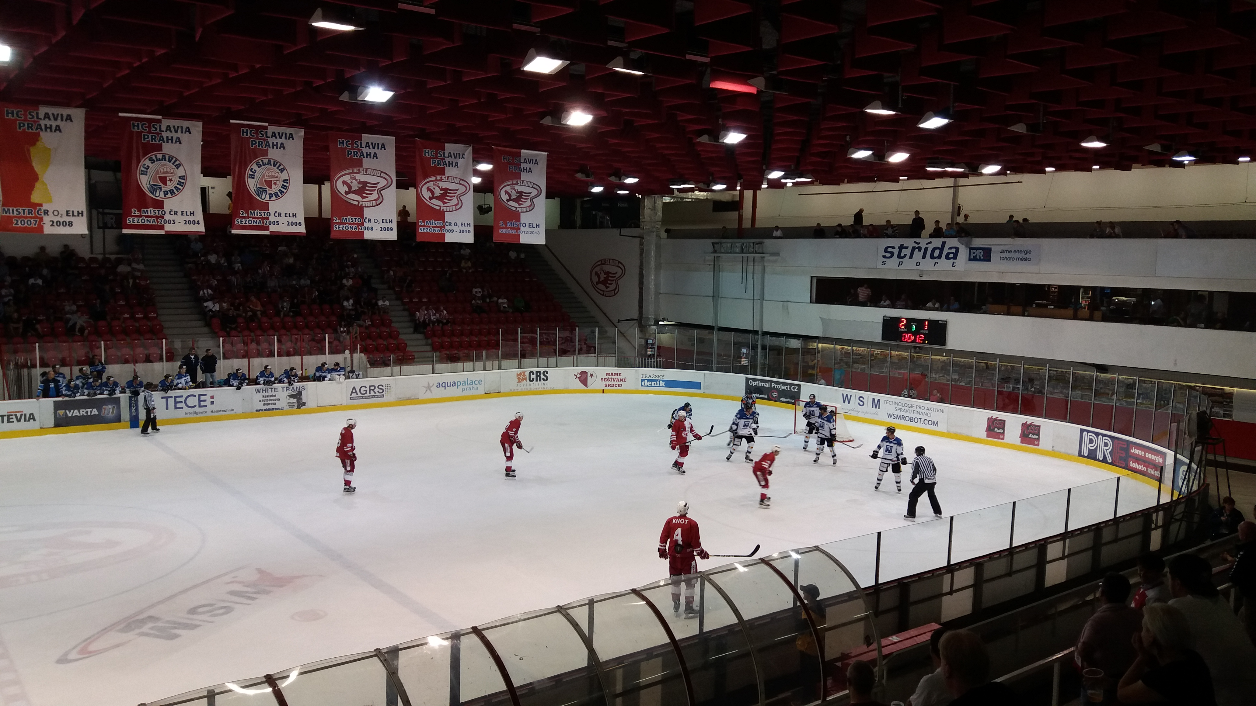 Utkání HC Slavia Praha – HC AZ 2010 Havířov (2:1) odehrané 12. září 2016 v pražském Edenu.